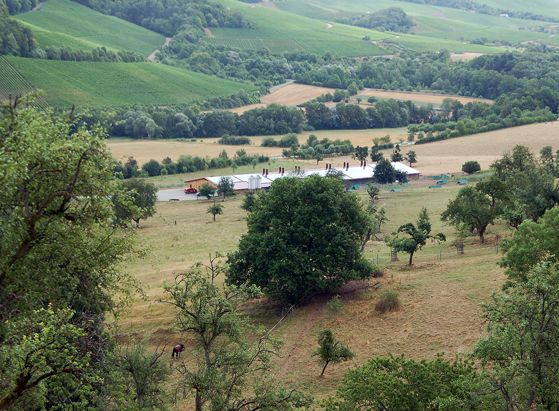 Stallung und Weideflächen der Bromberger Höfe (vom Burgstall im Süden)